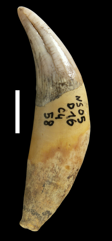 canine de Panthère (Panthera pardus) provenant du site Moustérien de la Grotte du Noisetier (Hautes-Pyrénées, France) (previously uploaded as Image:Panthera leo spelaea.jpg but it was a mistake)